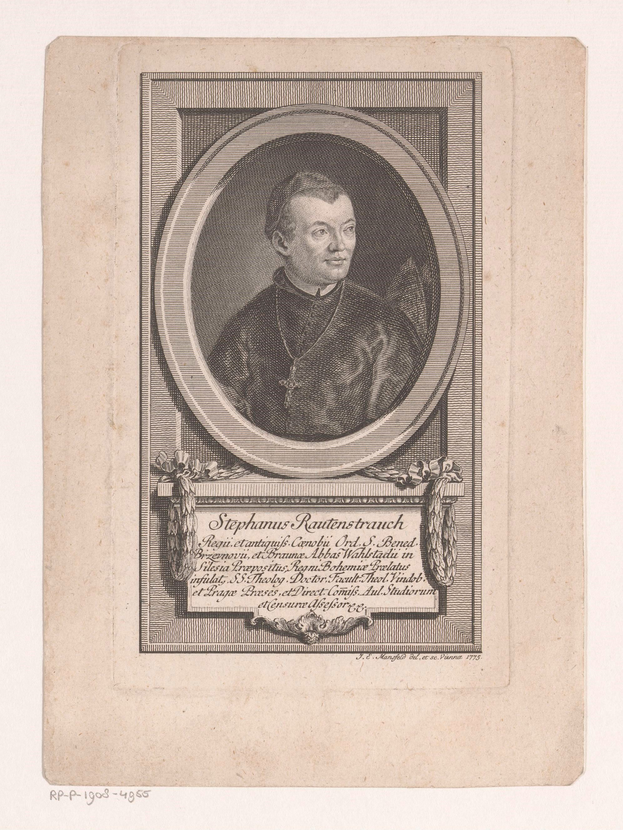 IdentificatieTitel(s): Portret van Franz Stephan RautenstrauchObjecttype: prent Objectnummer: RP-P-1908-4955Catalogusreferentie: HAB A 17270Collectie Rijksmuseum-2(2)Opmerking: Met naam van prentmaker en Datering: .Opschriften / Merken: verzamelaarsmerk, verso, gestempeld: Lugt 2228VervaardigingVervaardiger: prentmaker: Johann Ernst Mansfeld (vermeld op object)naar tekening van: Johann Ernst Mansfeld (vermeld op object)Plaats vervaardiging: WenenDatering1775Fysieke kenmerken: ets en gravureMateriaal: papier Techniek: etsen / graveren (drukprocedé)Afmetingen: plaatrand: h 163 mm × b 100 mmOnderwerpWat: historical personsWie: Franz Stephan RautenstrauchVerwerving en rechtenVerwerving: aankoop 1905Copyright: Publiek domein